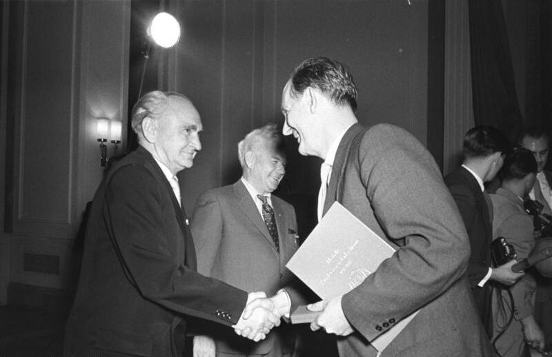 Zentralbild, 3.9.1958 Verleihung der "Medaille für Kämpfer gegen den Faschismus 1933 bis 1945" In einer Feierstunde im Haus der Ministerien in Berlin wurde am 3. September 1958 erstmalig die auf Vorschlag des Politbüros des ZK der SED gestiftete "Medaille" für Kämpfer gegen den Faschismus 1933 bis 1945" vom Ministerrat verliehen. UBz. Prof. Dr. Robert Havemann (rechts) empfängt Urkunde und Medaille aus der Hand Hermann Materns und Glückwünsche von Heinrich Rau (links).